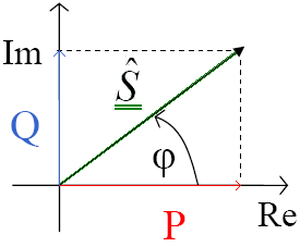 Vztahy mezi druhy elektrických výkonů. Tzv. trojúhelník výkonů - jalového, činného a zdánlivého.